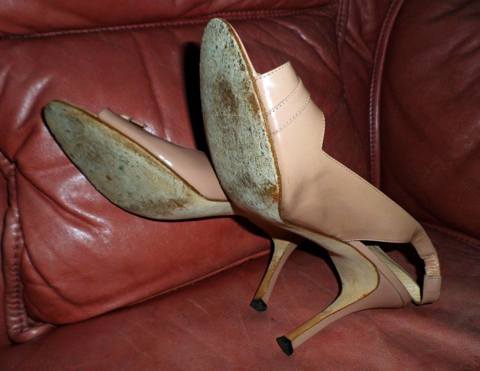 Les chaussures que porte Sandra Bullock dans le film The Blind Side et sur l'affiche officielle (collection personnelle)